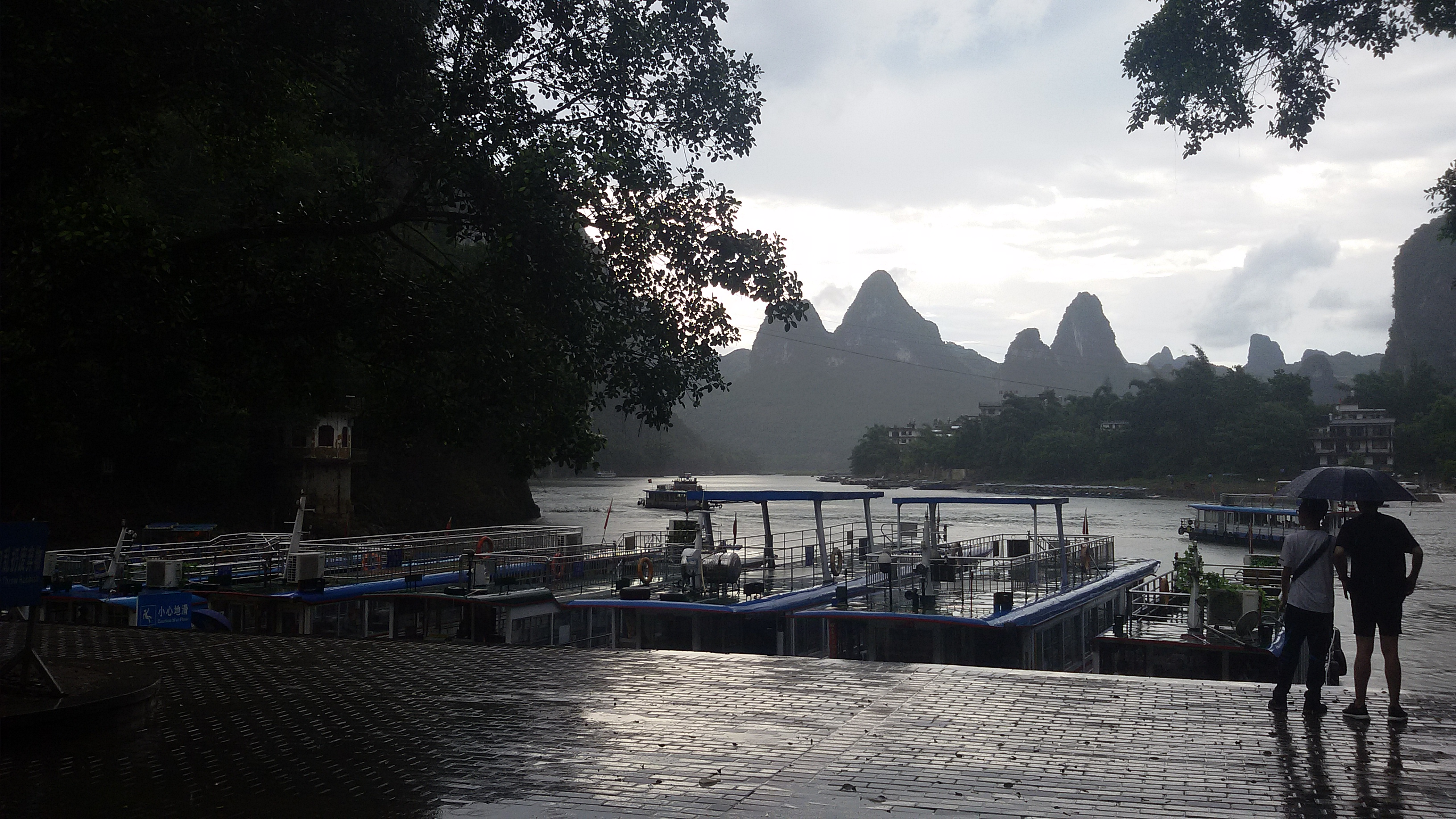 粵語: 陽朔興坪碼頭